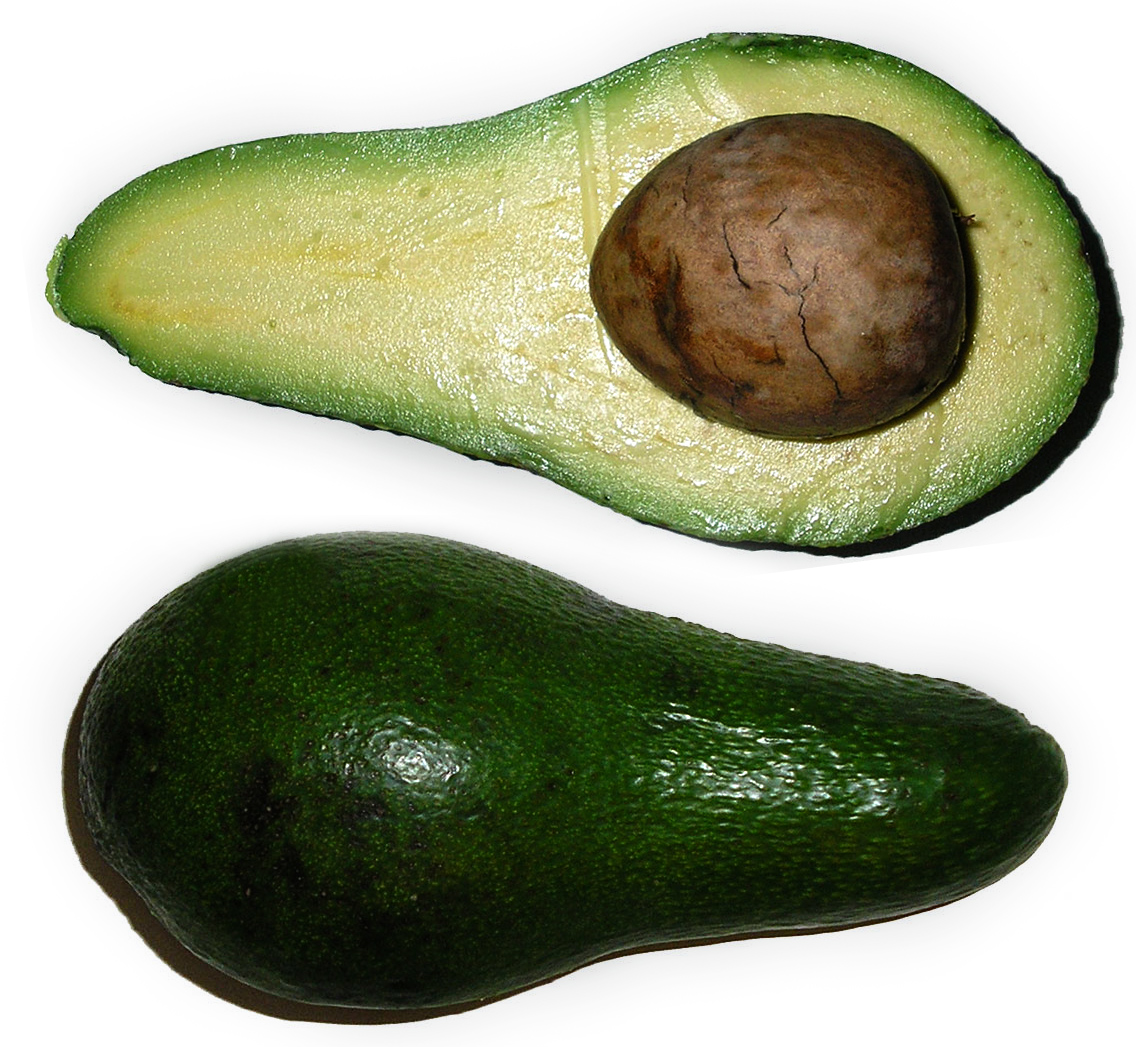 Bildbeschreibung:Persea americana Intformation: überarbeitete Version von Avocado.jpg